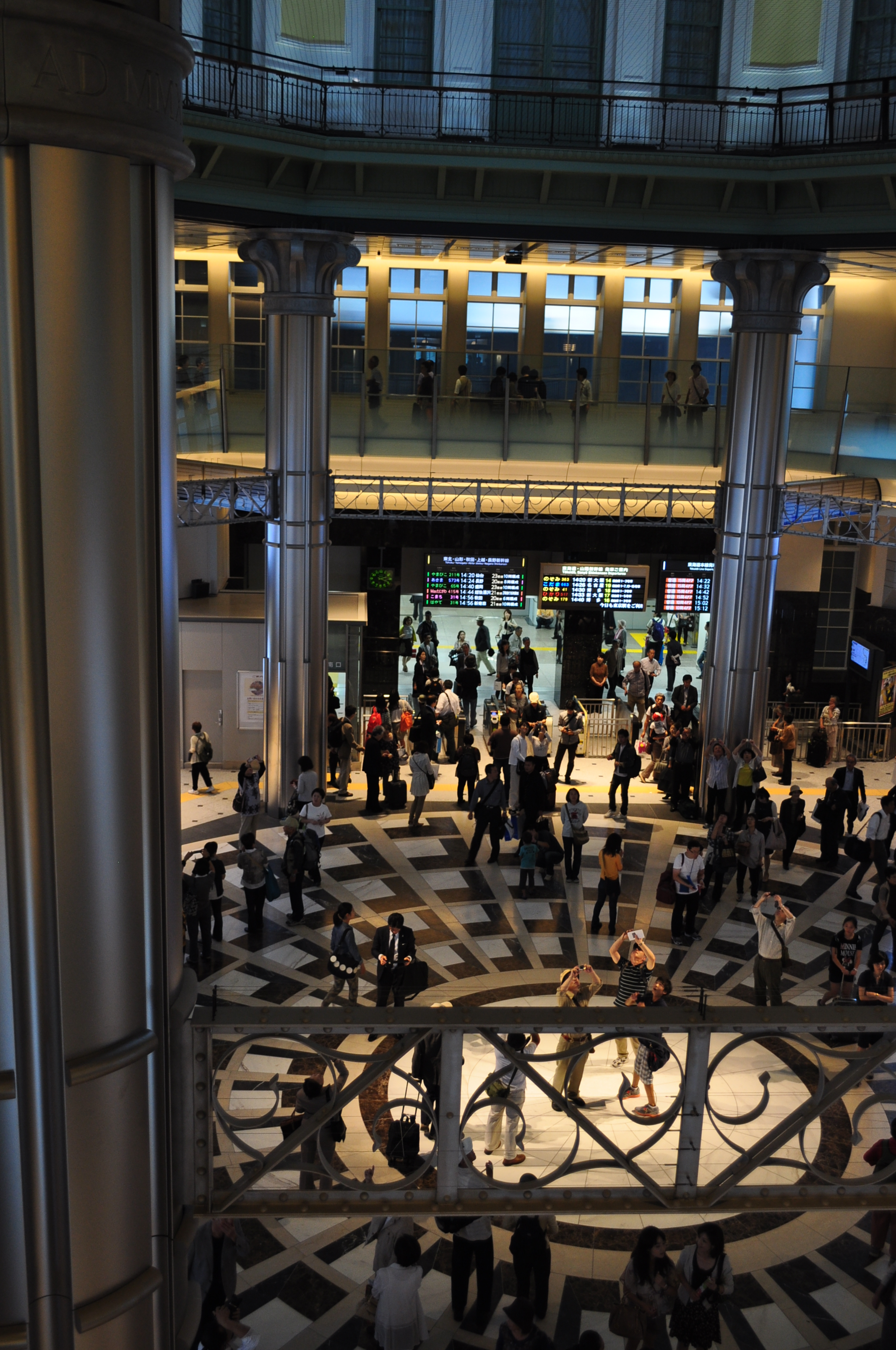 2階より東京駅丸の内南口改札